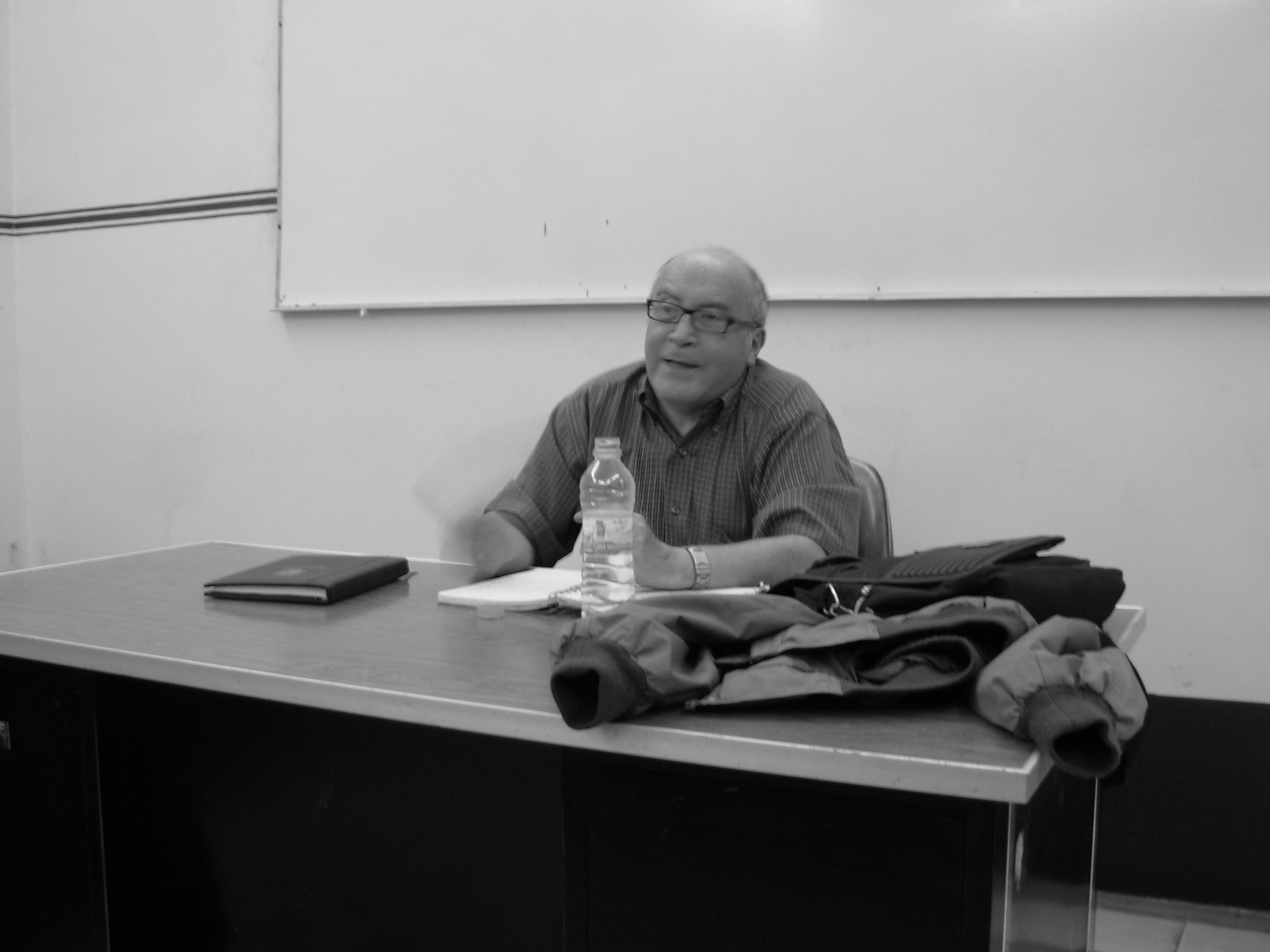 Renato Prada en una de sus clases.